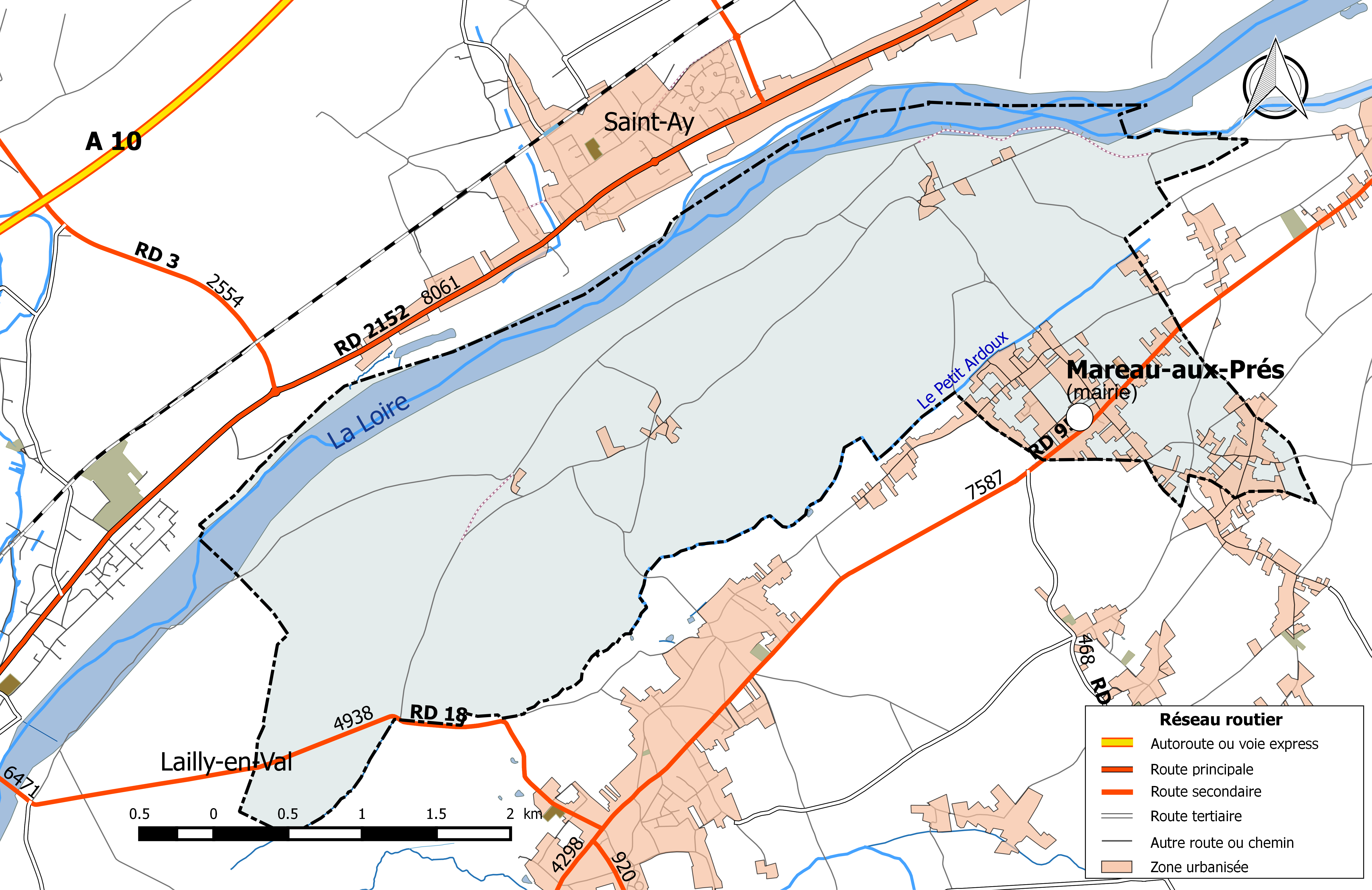 Carte du réseau routier de la commune de Mareau-aux-Prés.